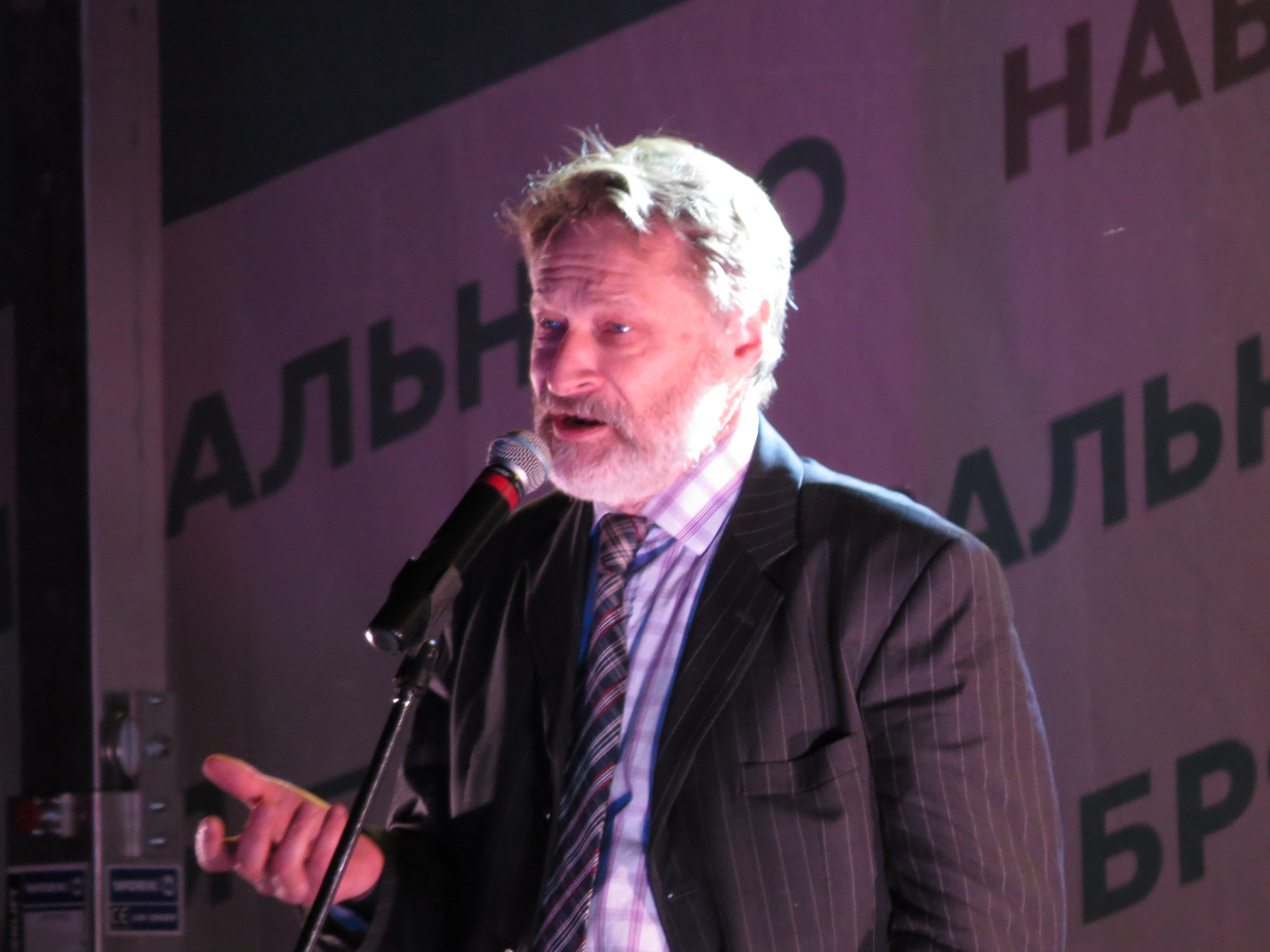 Митинг Алексея Навального на Болотной площади после объявления результатов выборов мэра Москвы, 9 сентября 2013 года